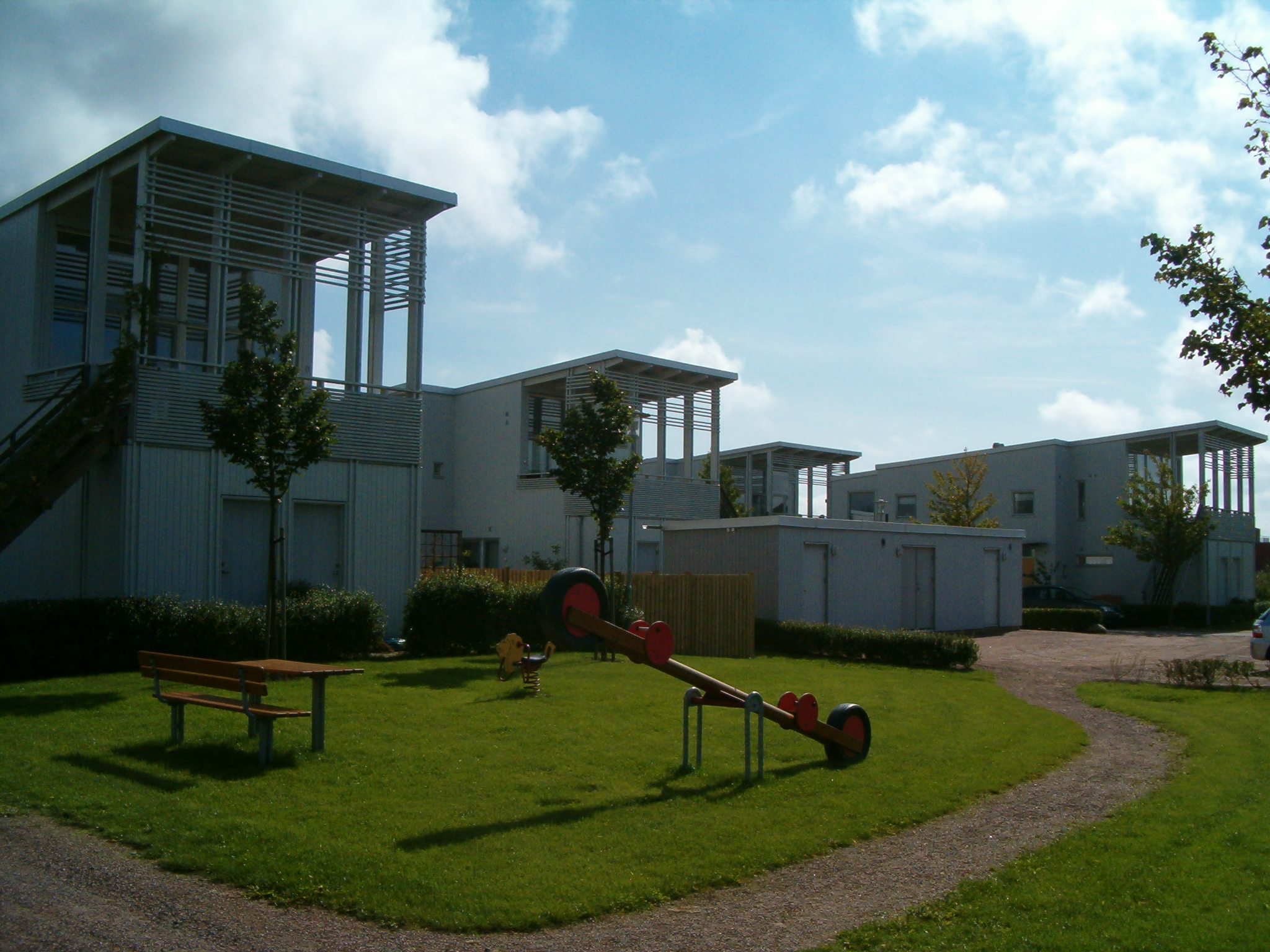 Buildings in Mariastaden, Helsingborg.